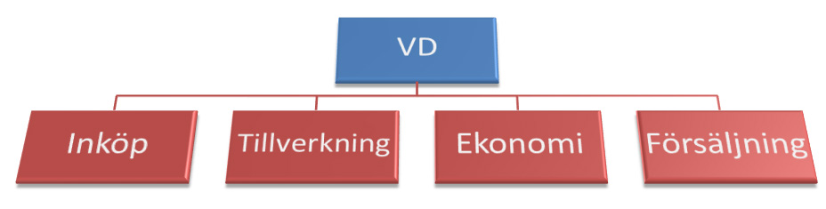 Bild på funktionsorganisation